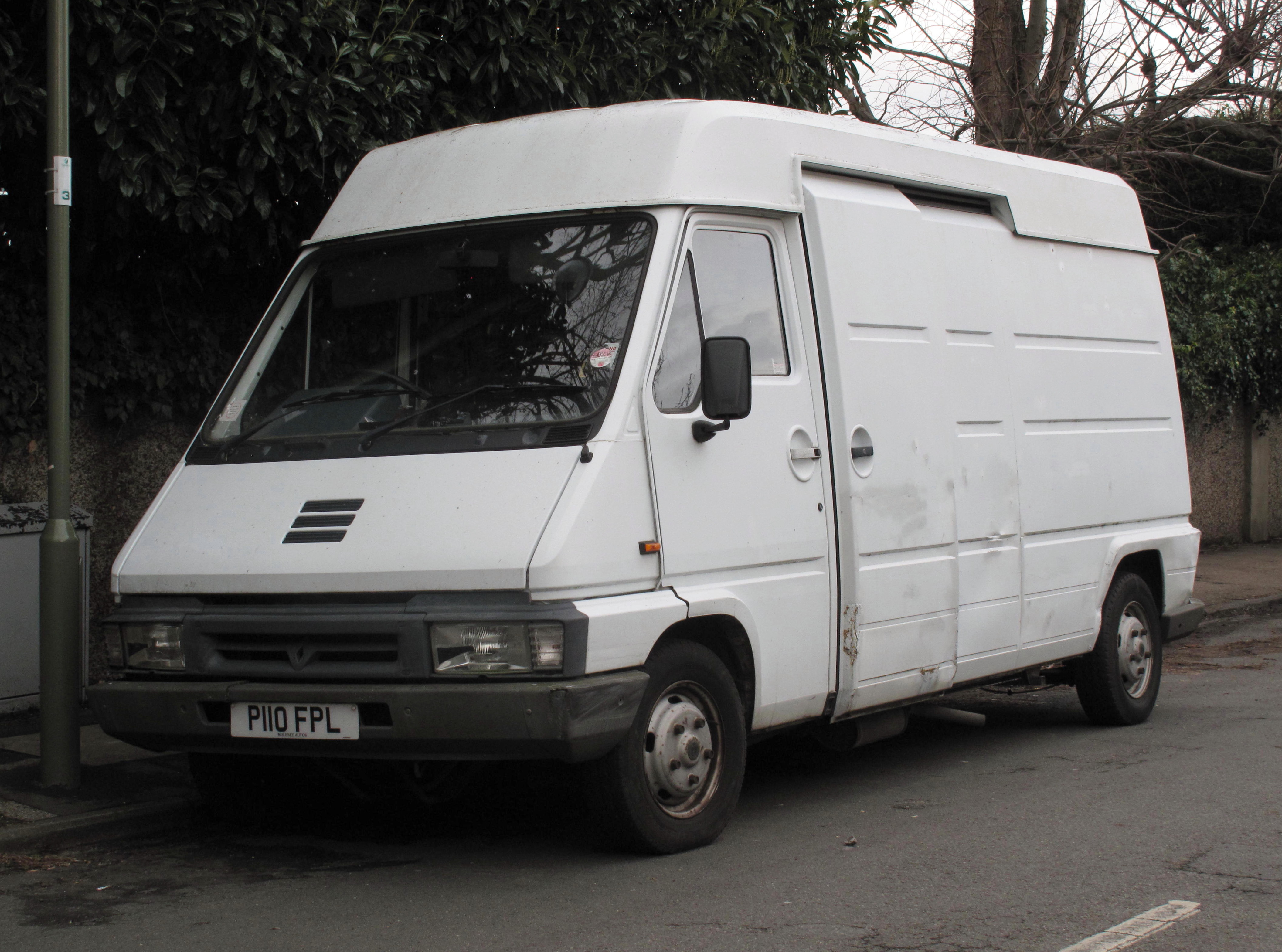 1997 Renault Master 2.5 T35B lwb